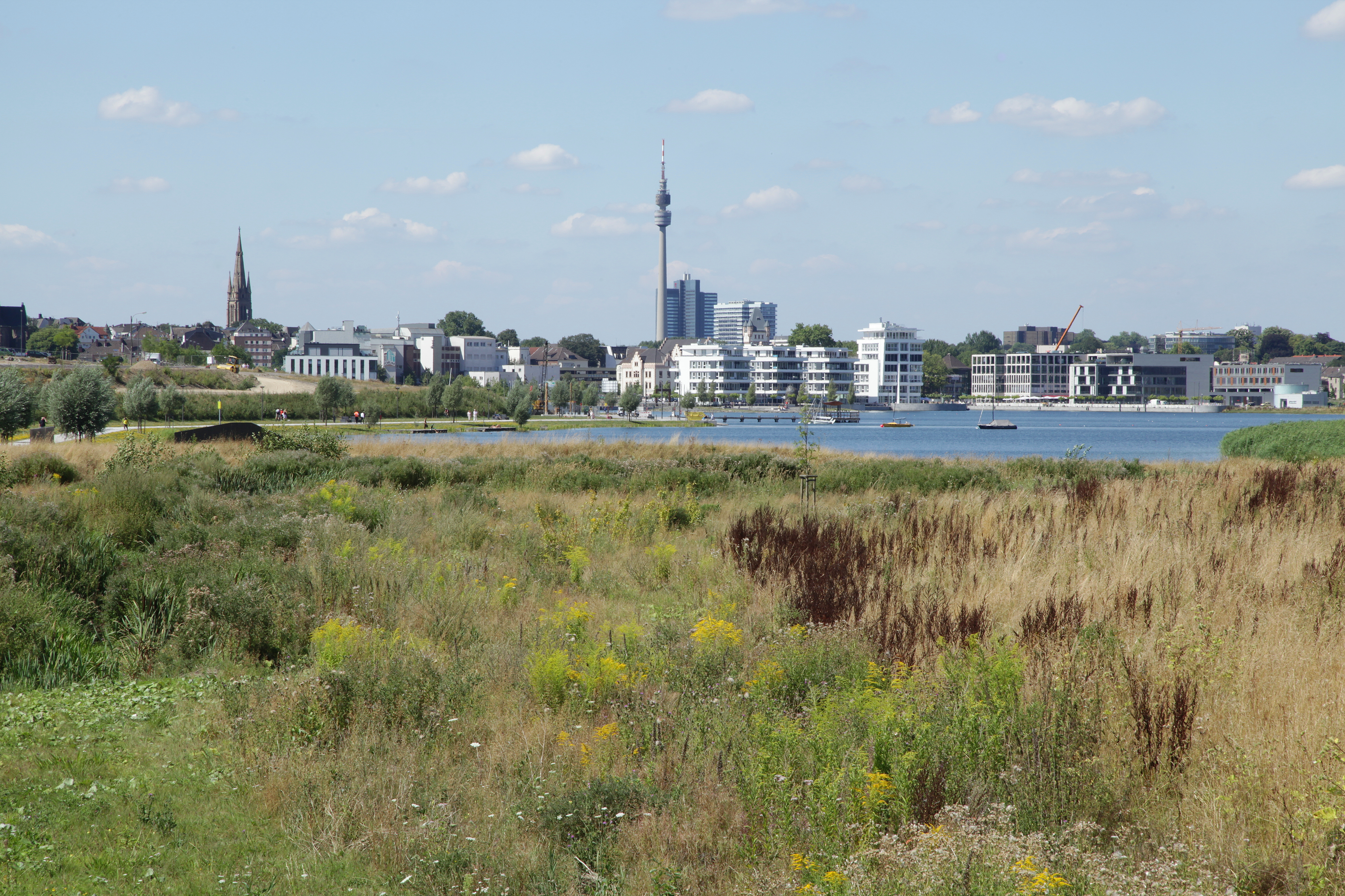 Dortmund-Hörde hinter dem Phoenix-See in Dortmund